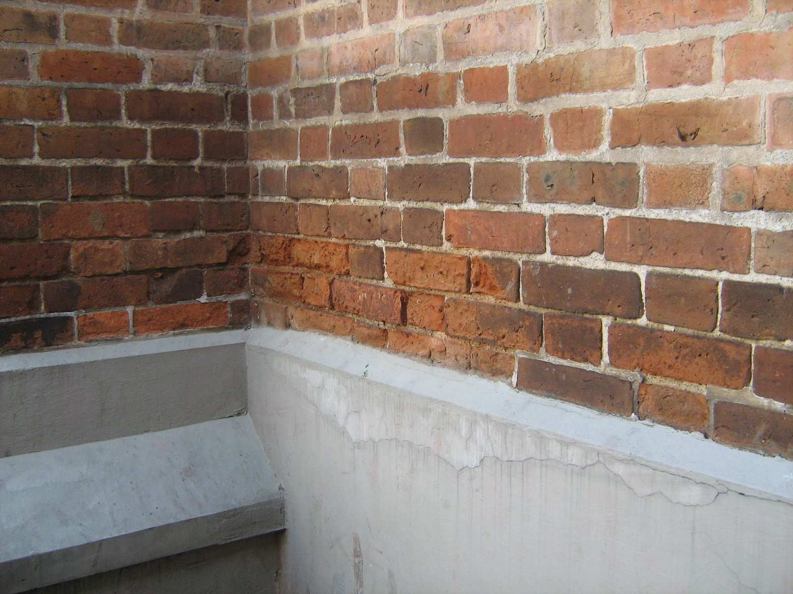 Deterioro superficial causado por la humedad, en la Catedral Metropolitana de Medellín. Colombia